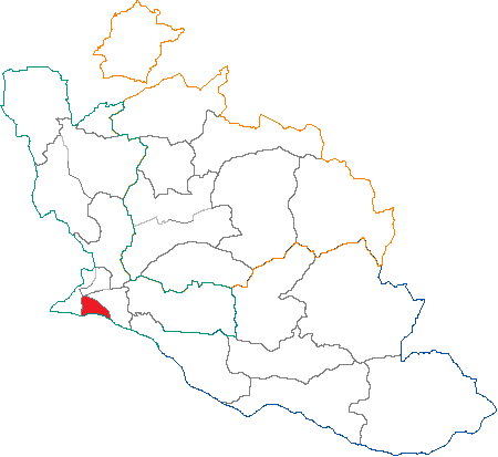 Situation du canton dans le département de Vaucluse (France)